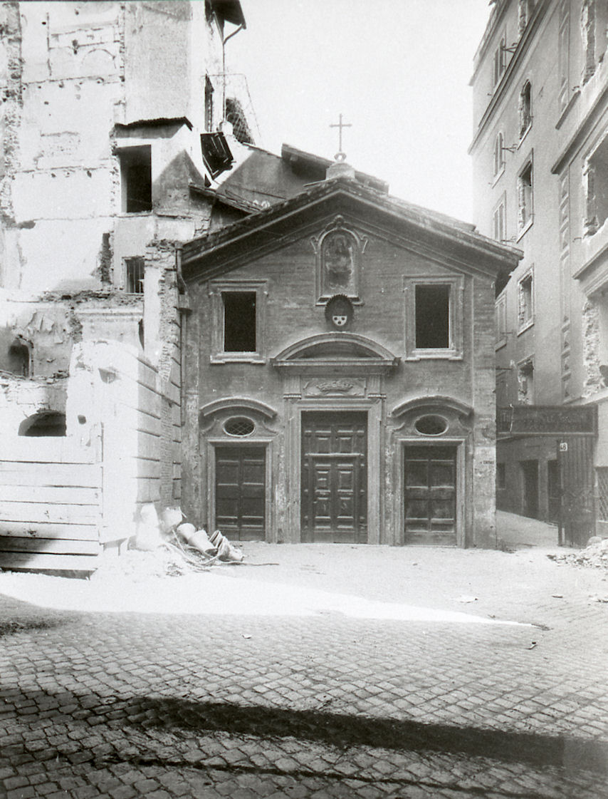 Chiesa distrutta di Sant'Andrea in Vincis